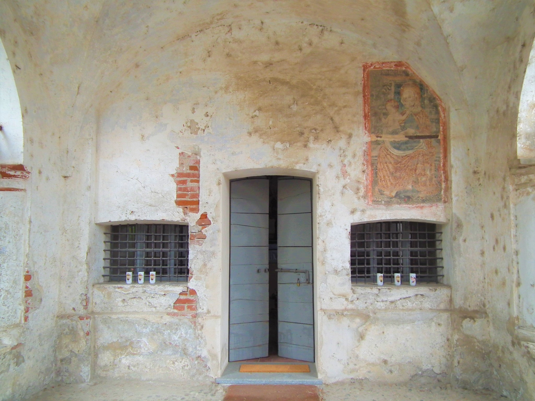 Porticato d'ingresso della Chiesa di Sant'Antonio nel comune di Mandello Vitta.